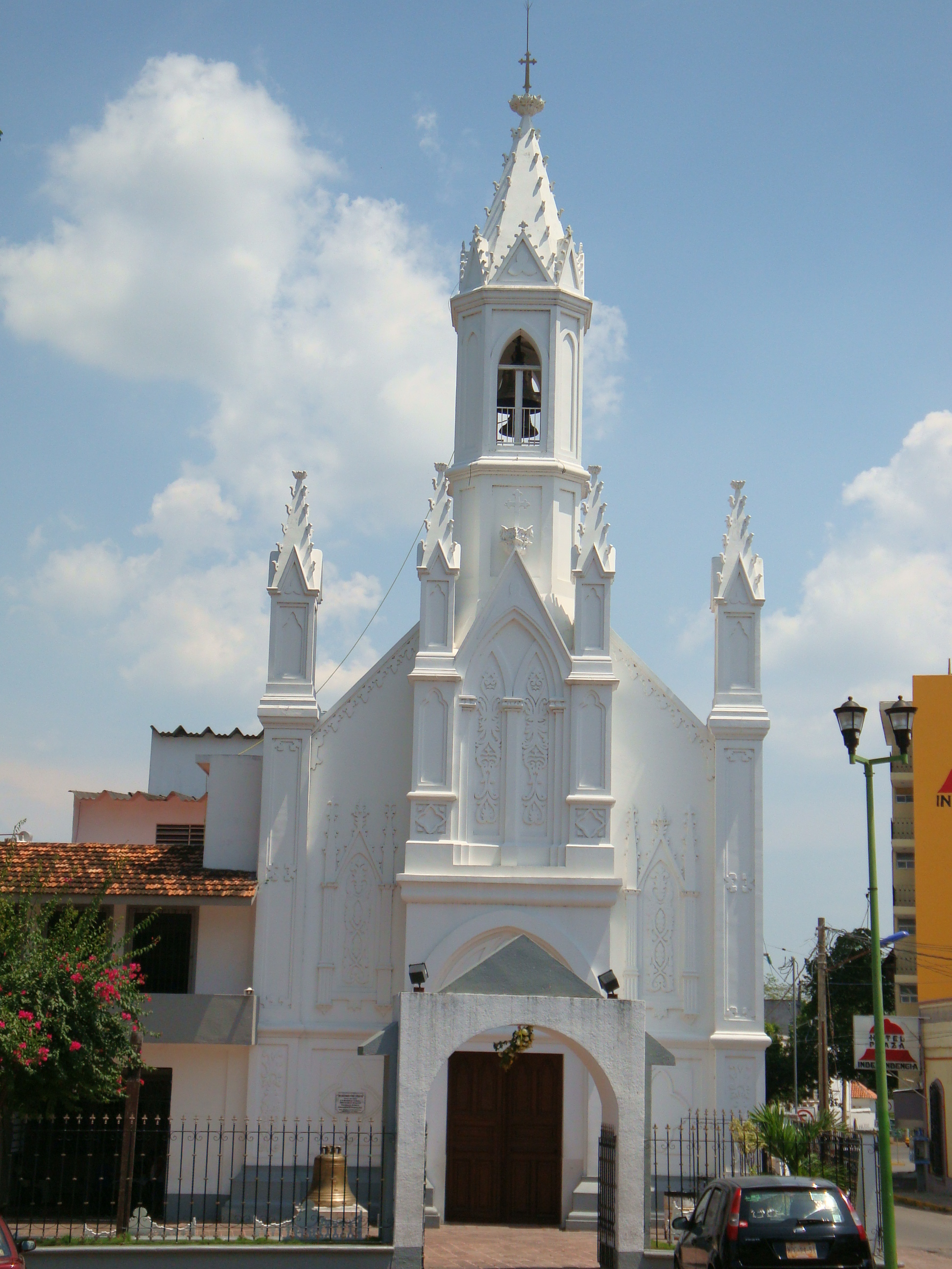 Fachada de la iglesia de la Purísima Concepción, en la ciudad de Villahermosa, Tabasco, México.